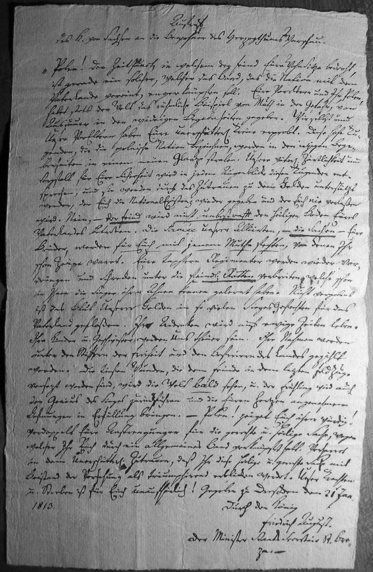 Aufruf des Königs von Sachsen an die Bewohner des Herzogthums Warschau, Dresden den 21. Januar 1813.